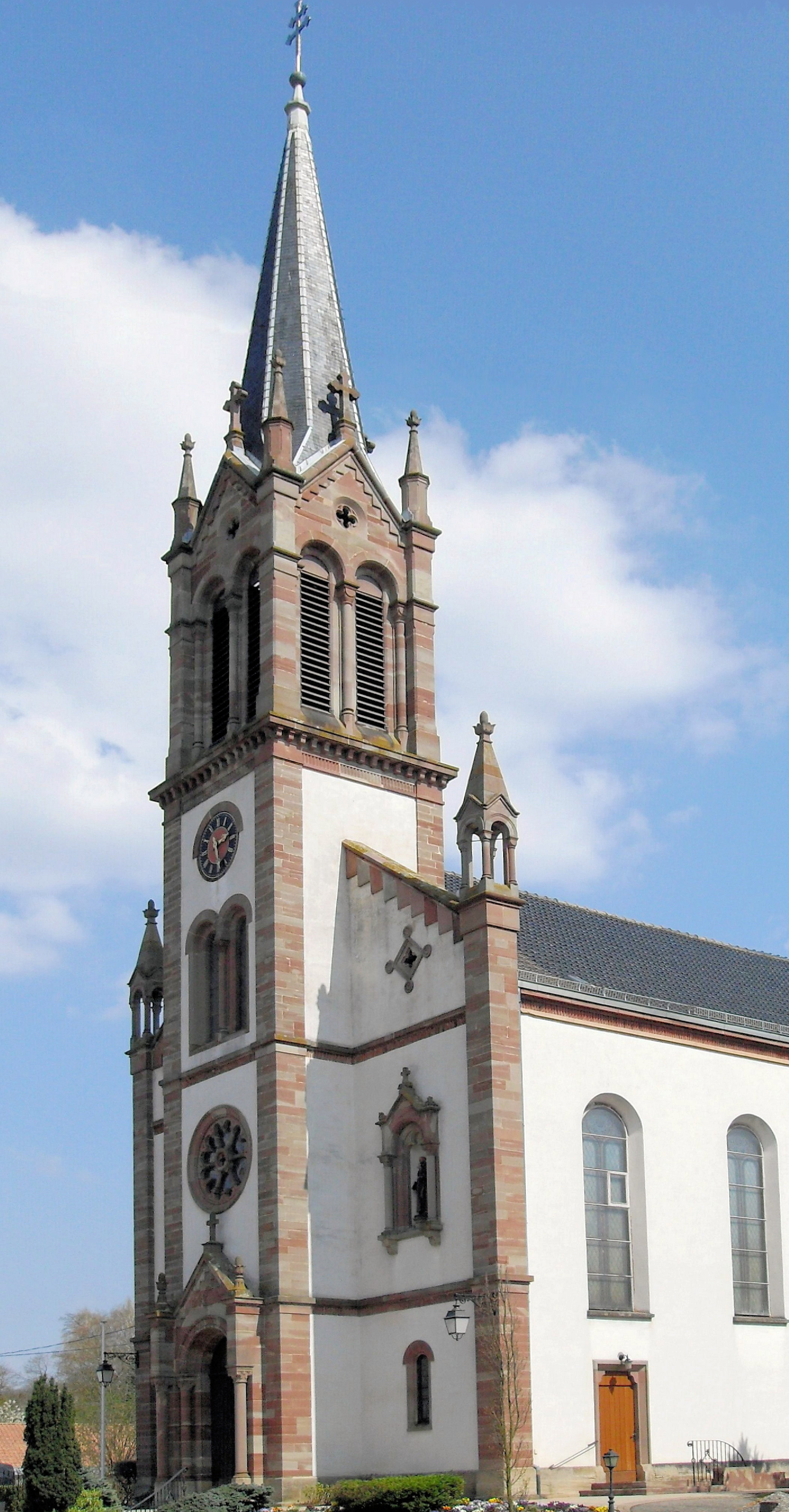 L'église Saint-Nicolas à Dietwiller